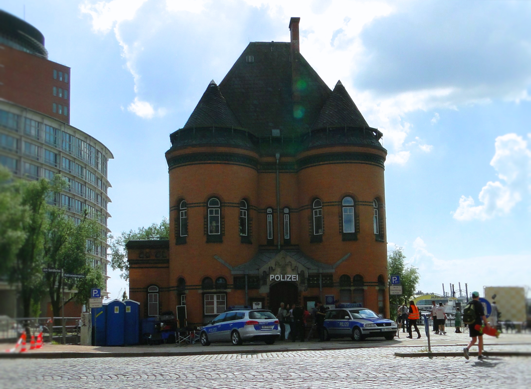 Set der Serie Notruf Hafenkante an der Kehrwiederspitze während Dreharbeiten